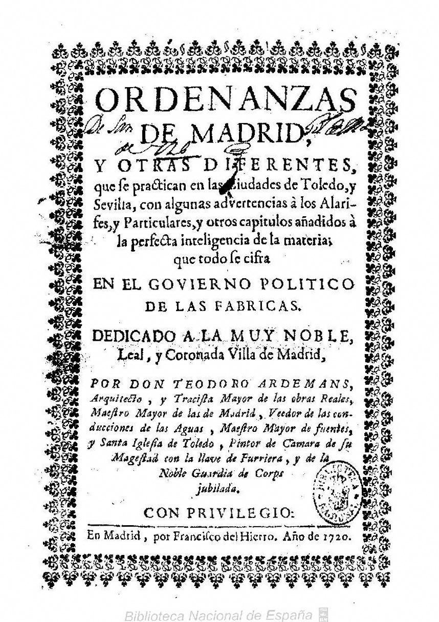 Ordenanzas de Madrid, y otras diferentes, que se practican en las Ciudades de Toledo, y Sevilla, con algunas advertencias á los alarifes, y particulares, y otros capitulos añadidos á la perfecta inteligencia de la materia : que todo se cifra en el govierno politico de las fabricas ... por ... Teodoro Ardemans ... Autor: Ardemans, Teodoro (1664-1726) Fecha: 1720 Datos de edición: En Madrid, por Francisco del Hierro